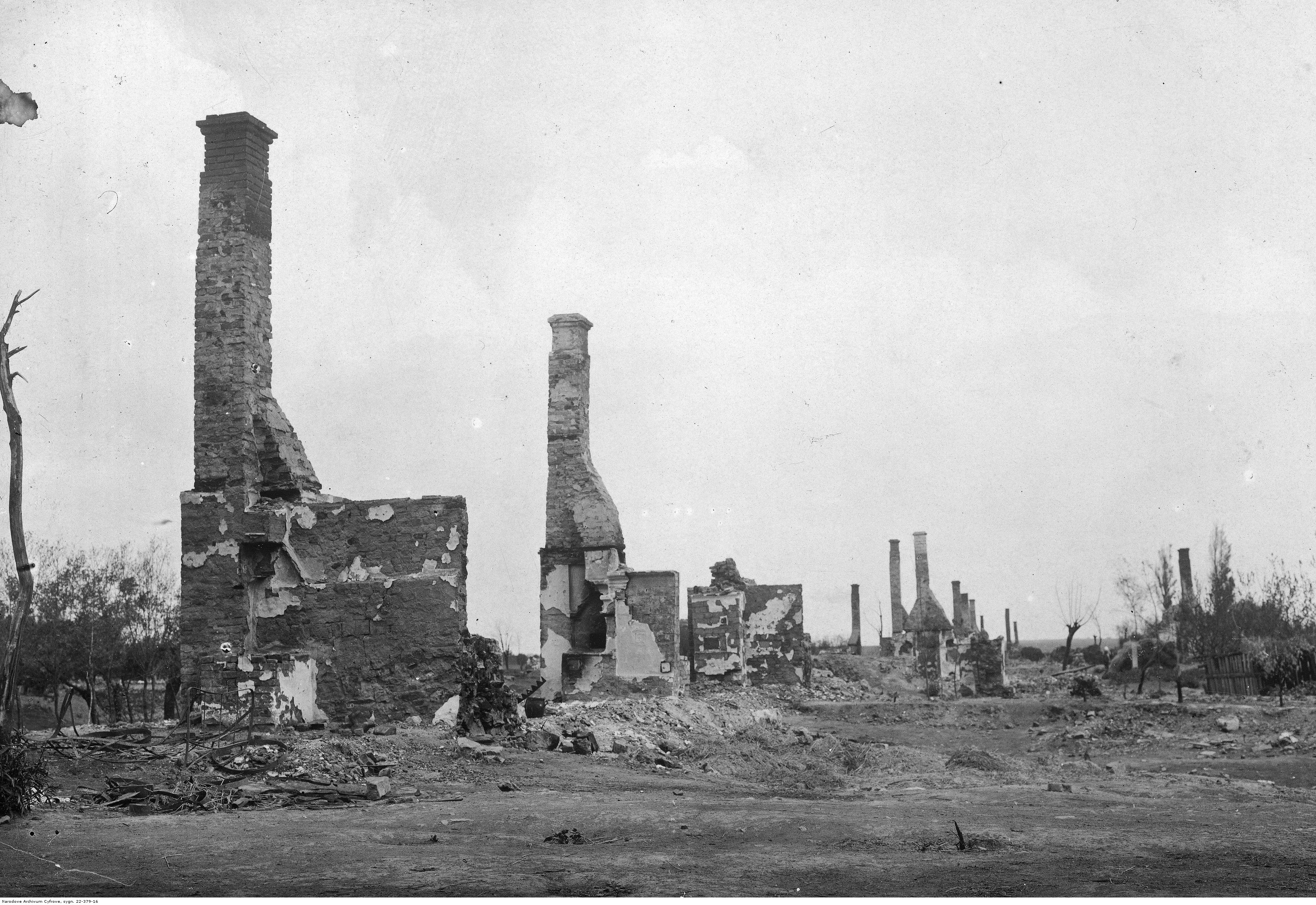 Spalone budynki.